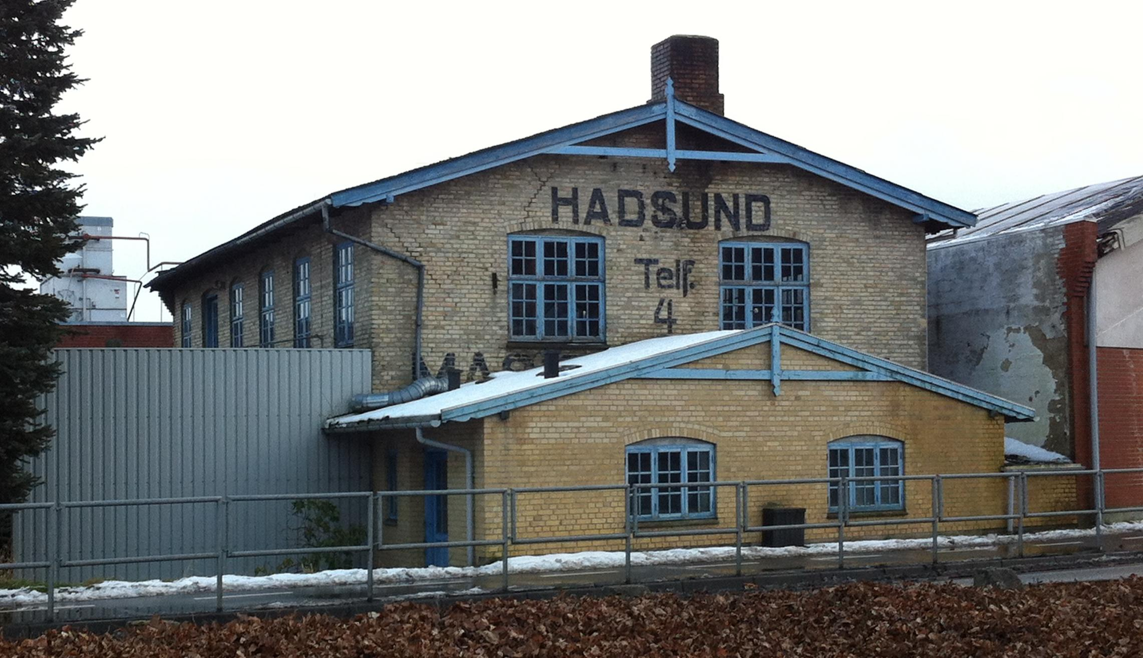 Det gamle Maskinsnedkeri i Hadsund er bygget i 1920. bygningen står i dag tom.